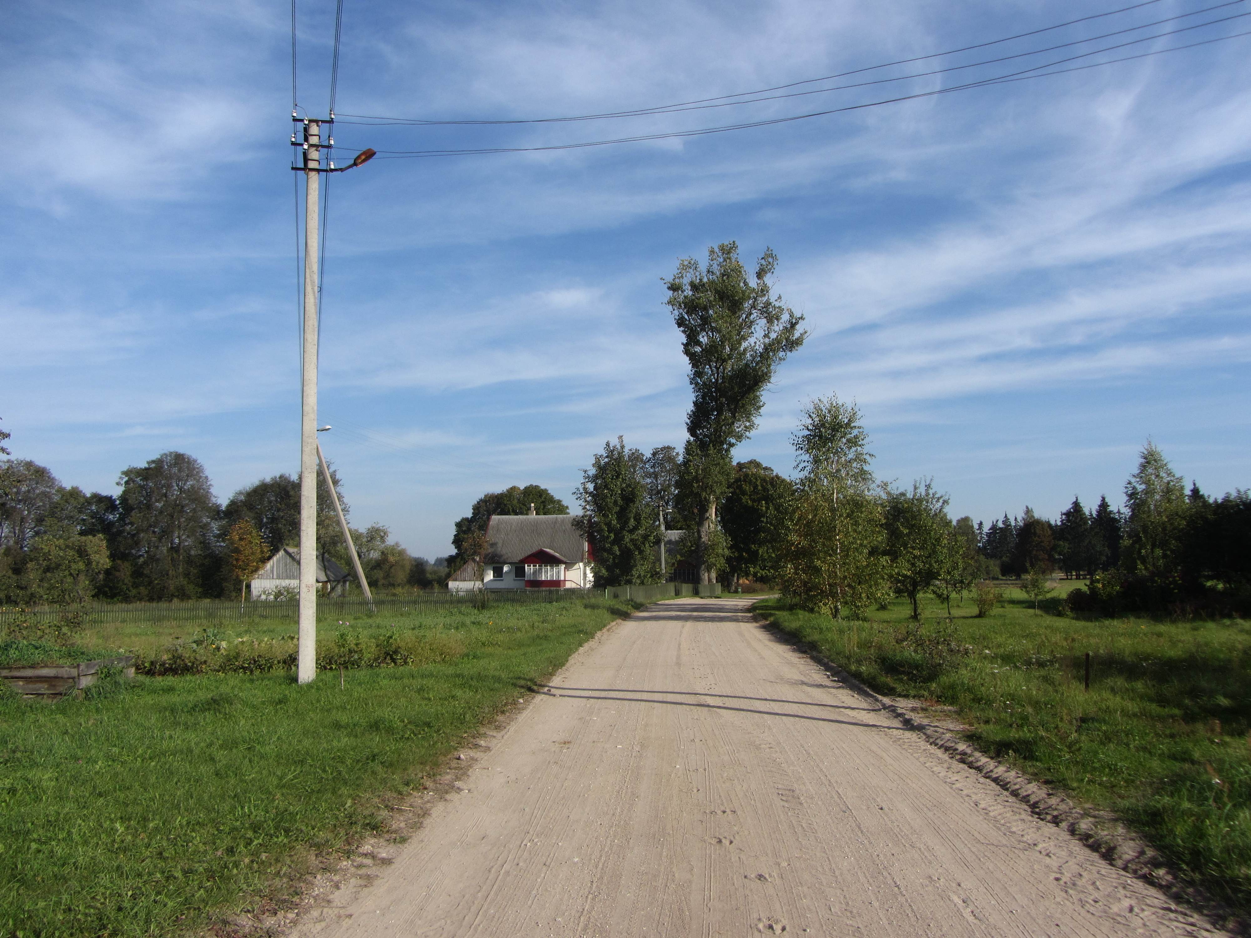 Vazgirdonys 65426, Lithuania